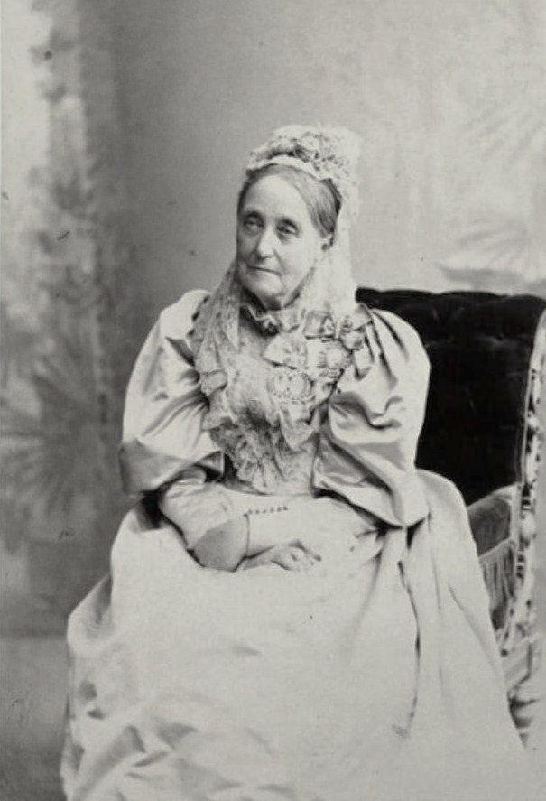 Княгиня Надежда Борисовна Трубецкая (1812-1909)